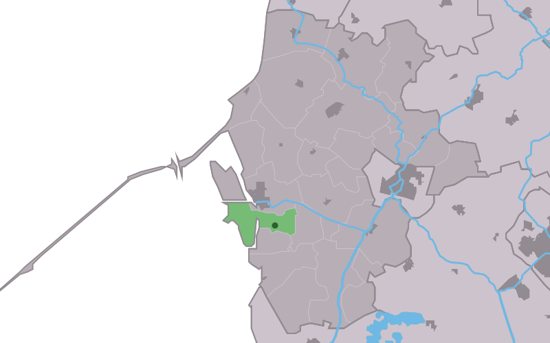 Kaartsje fan himrik fan Skuzum